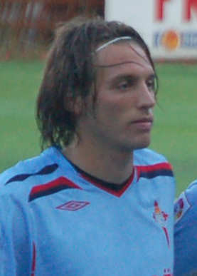 Miguel Pérez Cuesta, no 2009 xogando co RC Celta de Vigo o trofeo Cidade de Pontevedra.